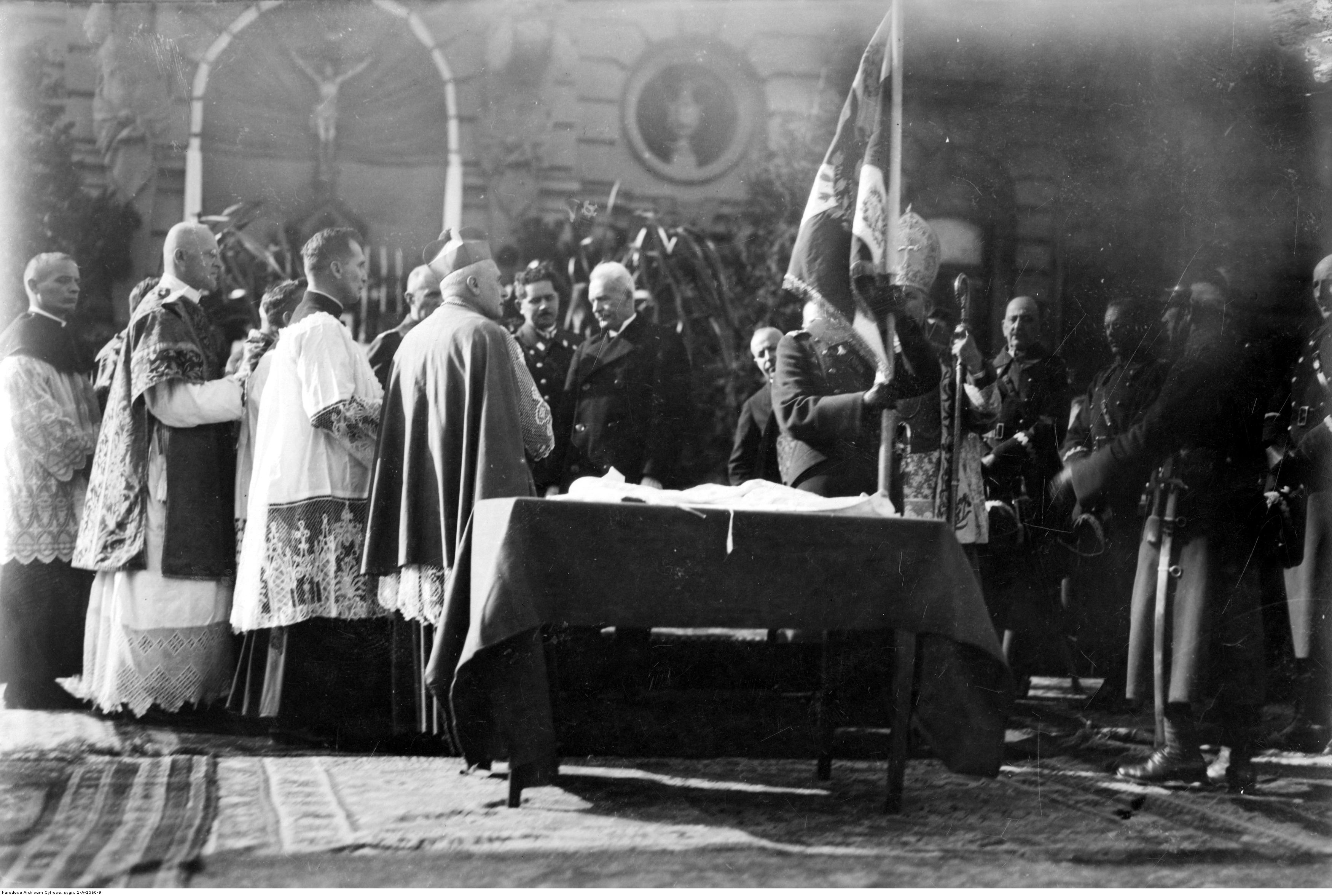 Wizyta prezydenta RP Ignacego Mościckiego w Nowym Sączu. Prezydent RP Ignacy Mościcki na uroczystości poświęcenia sztandaru 1 Pułku Strzelców Podhalańskich; październik 1928. Koncern Ilustrowany Kurier Codzienny - Archiwum Ilustracji. Sygnatura: 1-A-1560-9